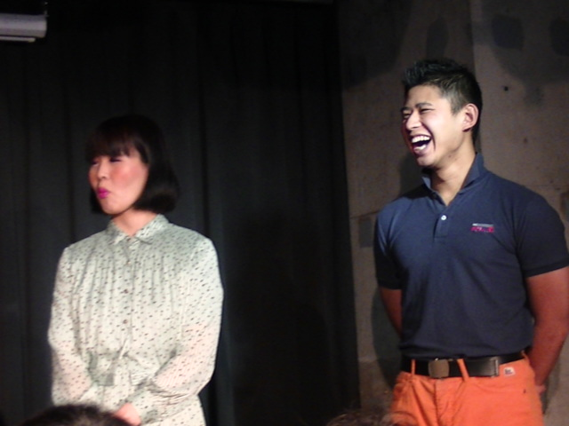 キラキラ関係 (2018年10月)